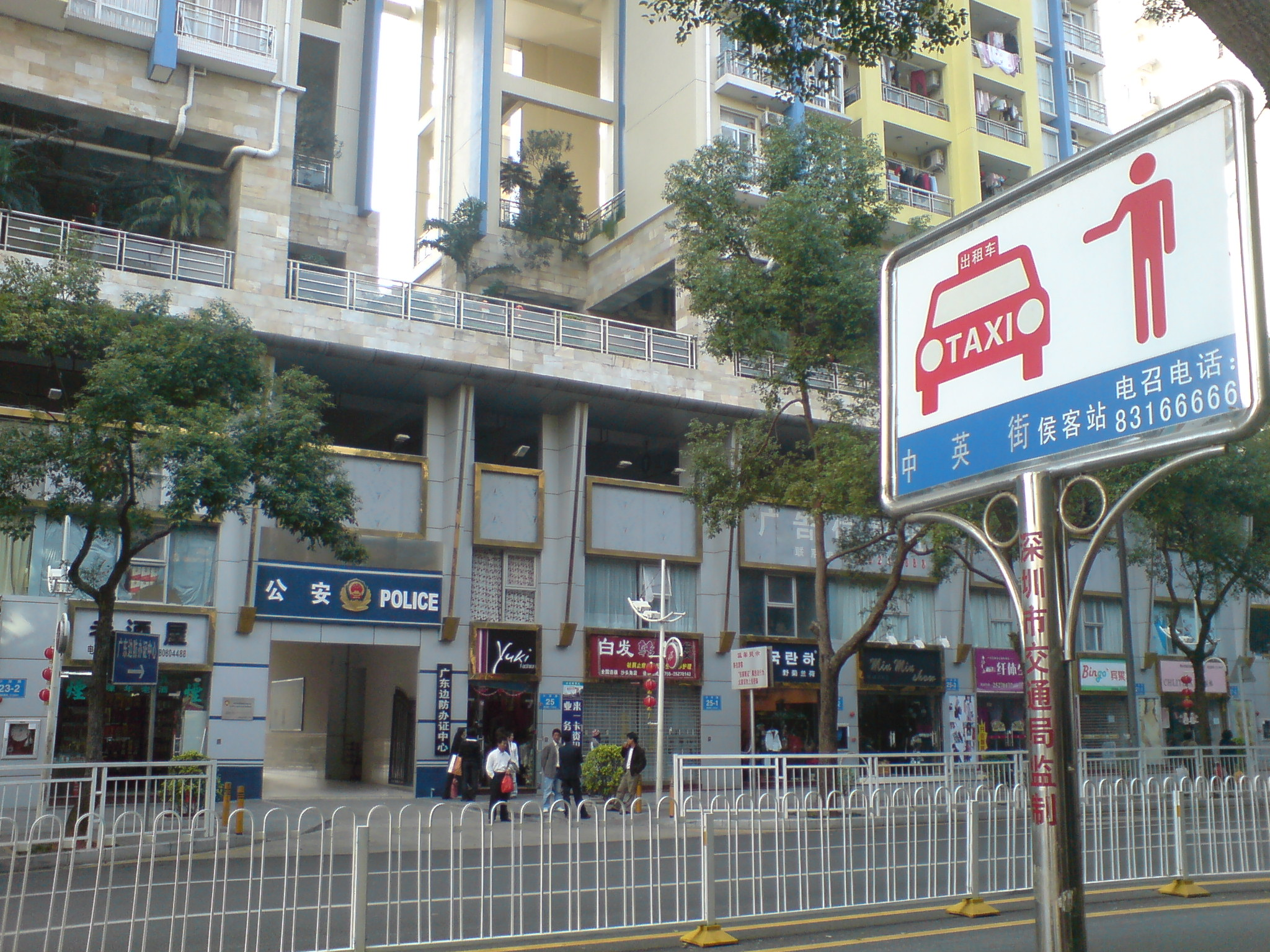 中文（香港）: 廣東邊防辦證中心